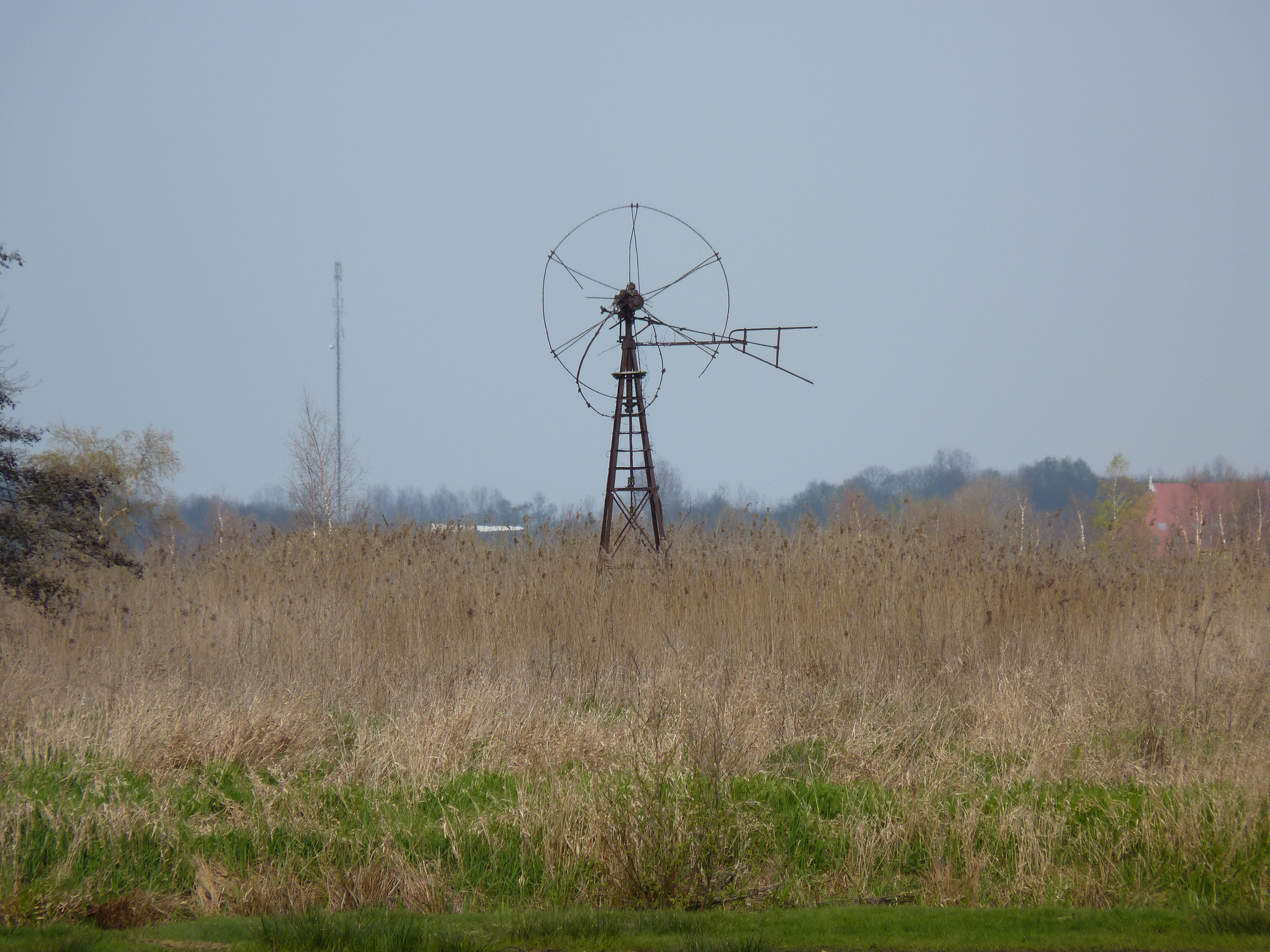 Spanga Windmotor